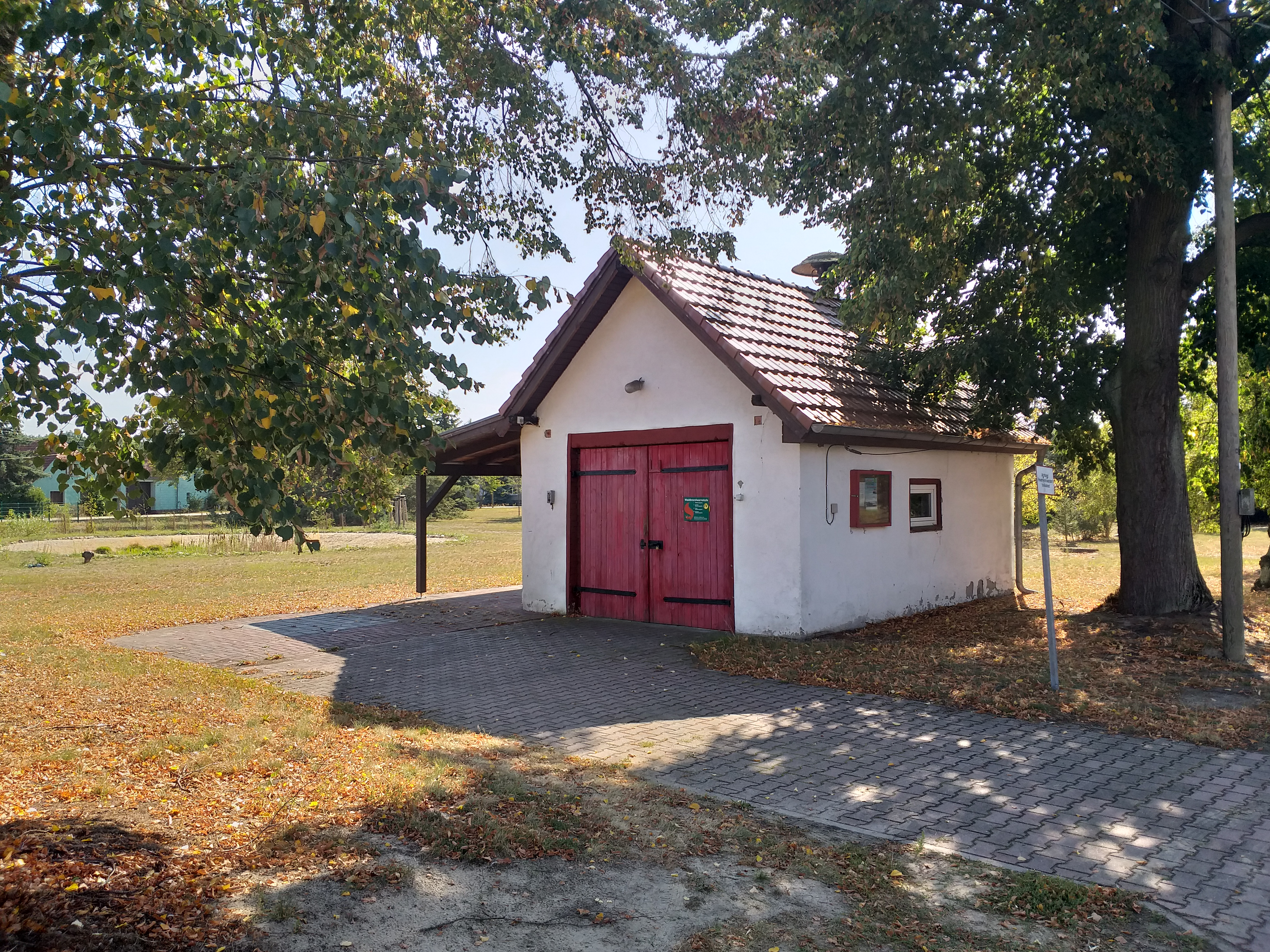 Gerätehaus der Freiwilligen Feuerwehr in Alteno, einem Gemeindeteil der Stadt Luckau in Brandenburg.